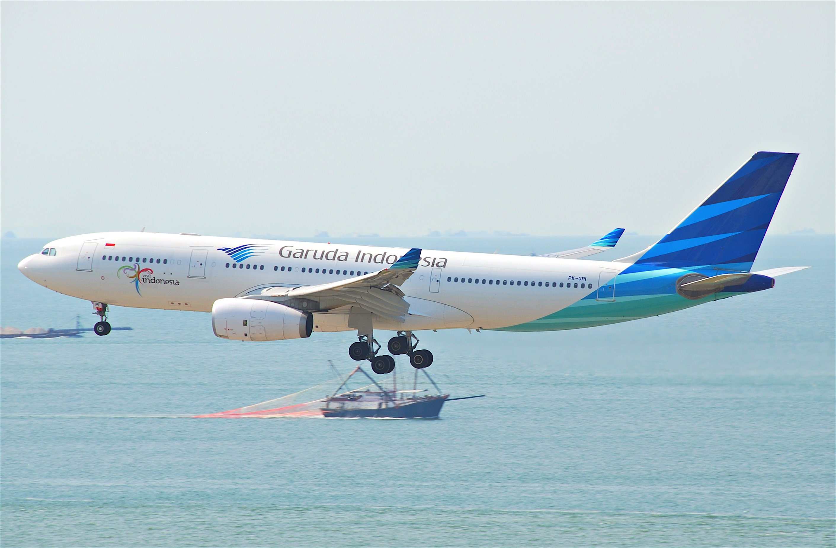 Garuda Indonesia Airbus A330-200; PK-GPI@HKG;04.08.2011/615xb